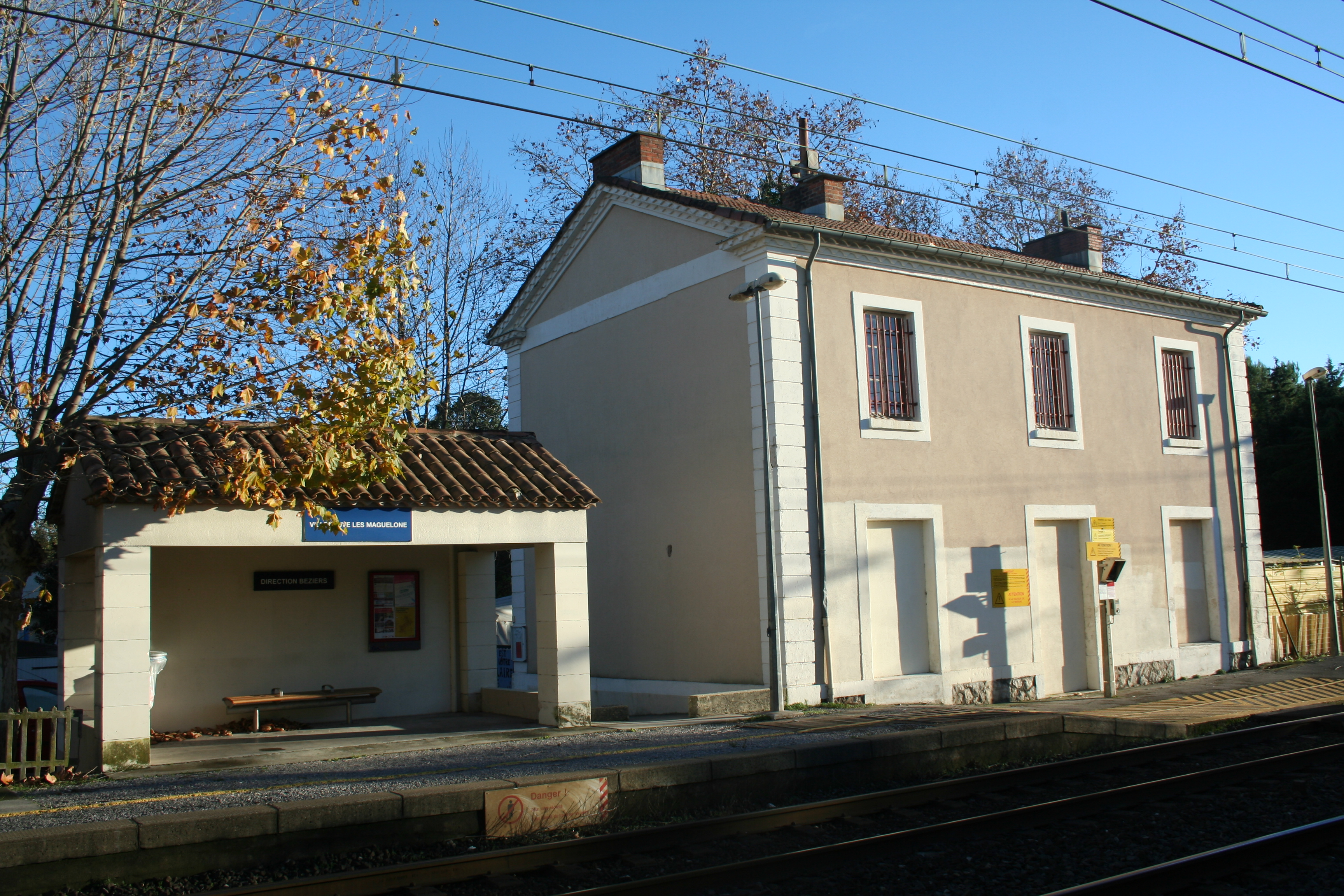 Villeneuve-lès-Maguelone (Hérault) - gare.